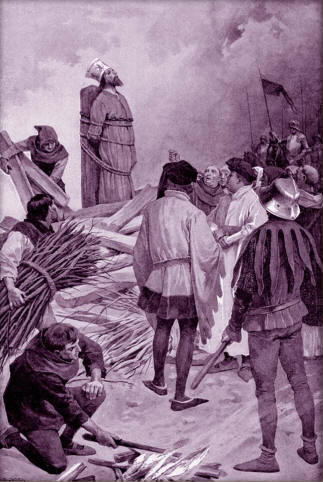 Věnceslav Černý - Upálení mistra Jana Husa